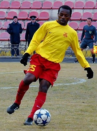 Франк Оливье Онгфианг — камерунский футболист.